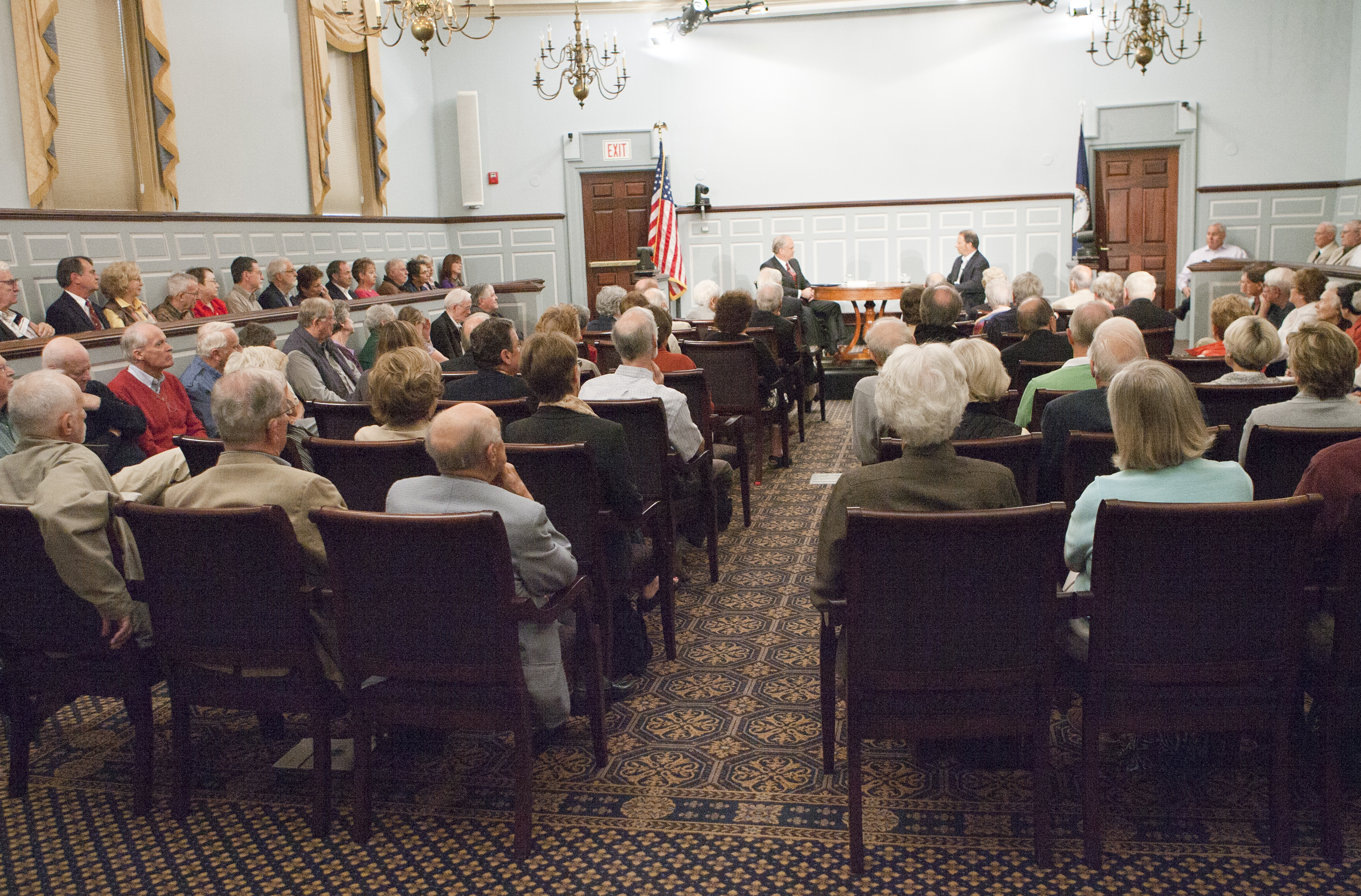 RS3J3361